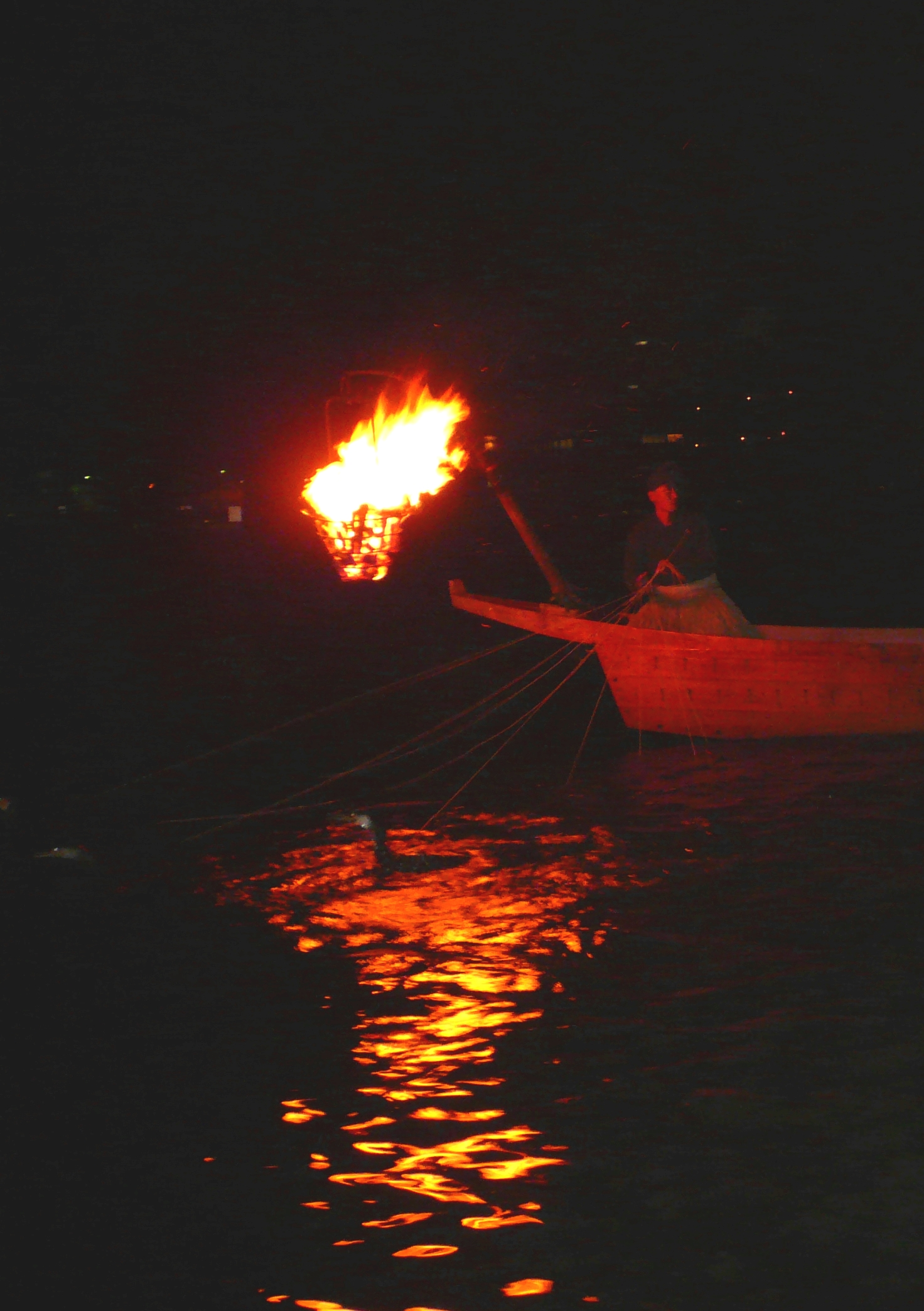 Ukai Nagaragawa（長良川鵜飼）,Gifu,Gifu(岐阜県岐阜市)で撮影。長良川のw:ja:鵜飼。